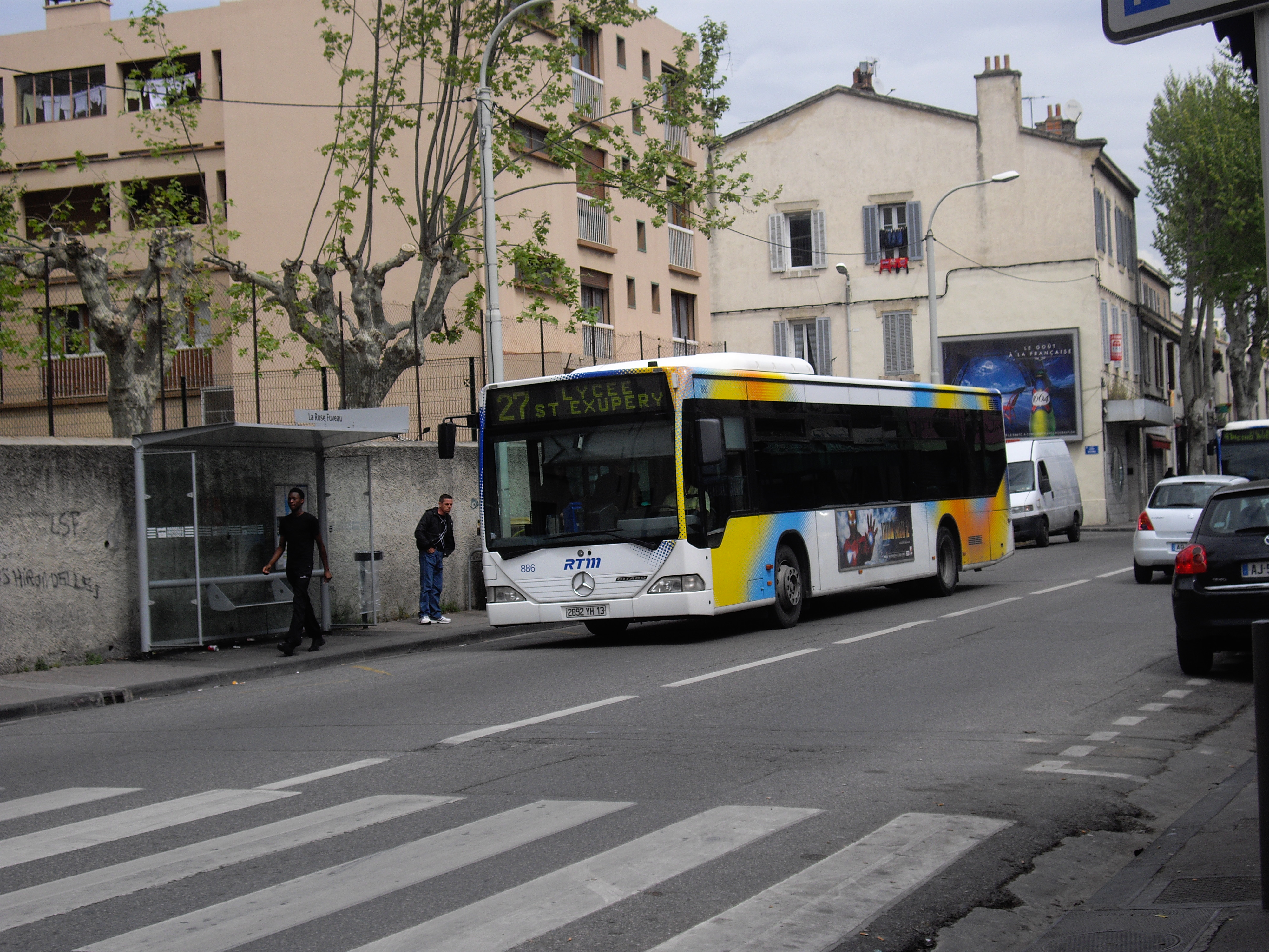 Mercedes Citaro - Ligne 27 du réseau RTM à Marseille - Quartier La Rose